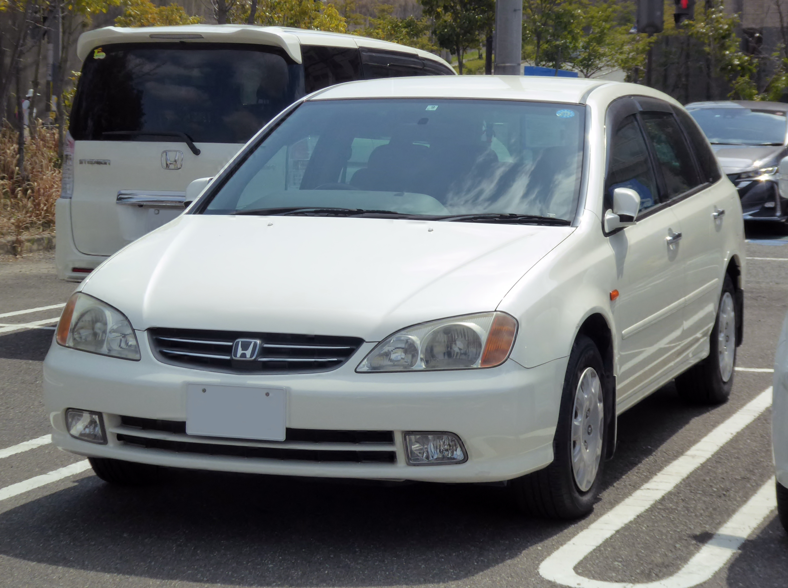 LA-TA3型オンダ・アヴァンシアVをフロントから撮影。